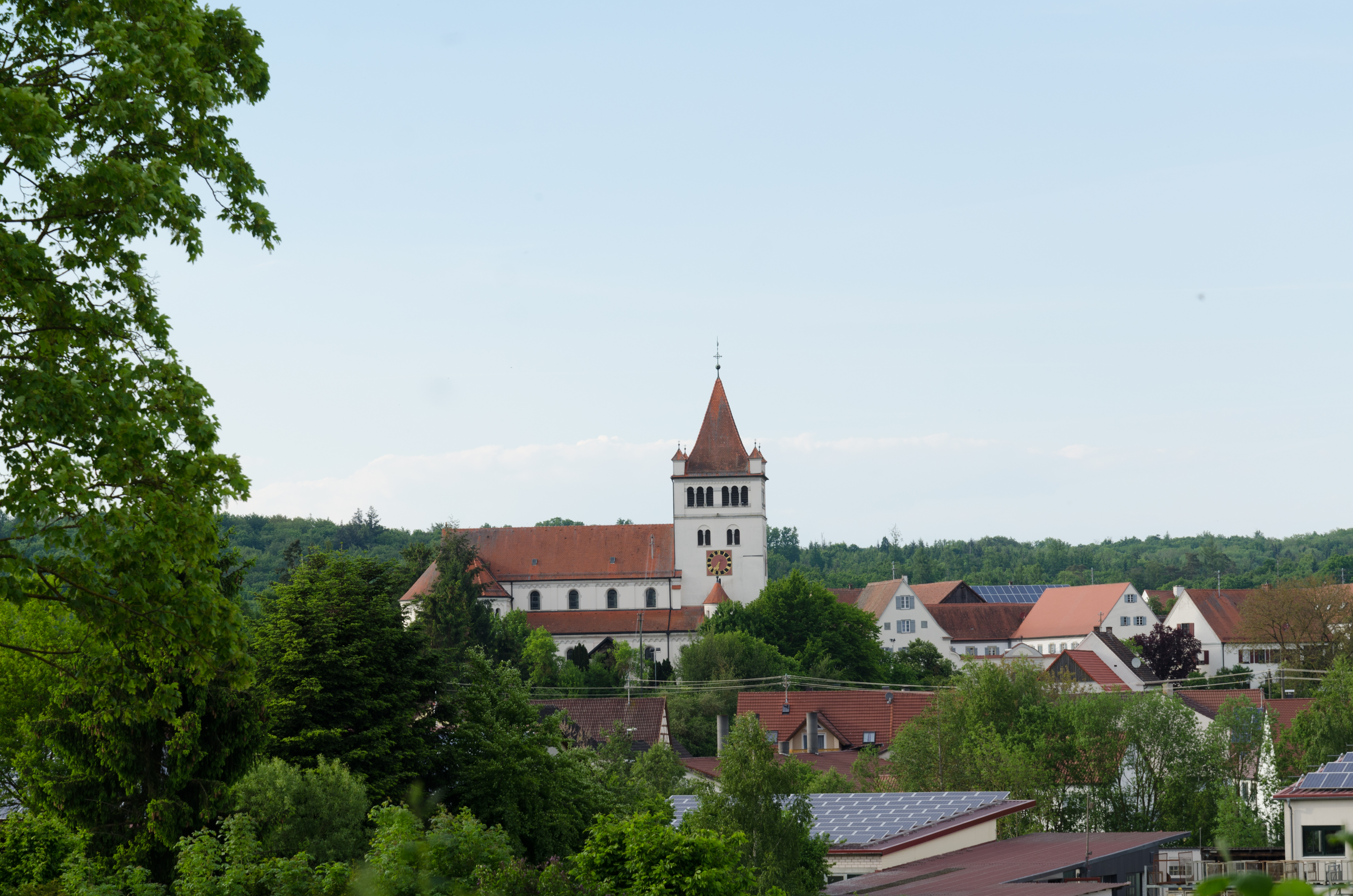 Fremdingen, Katholische Pfarrkirche St. Gallus